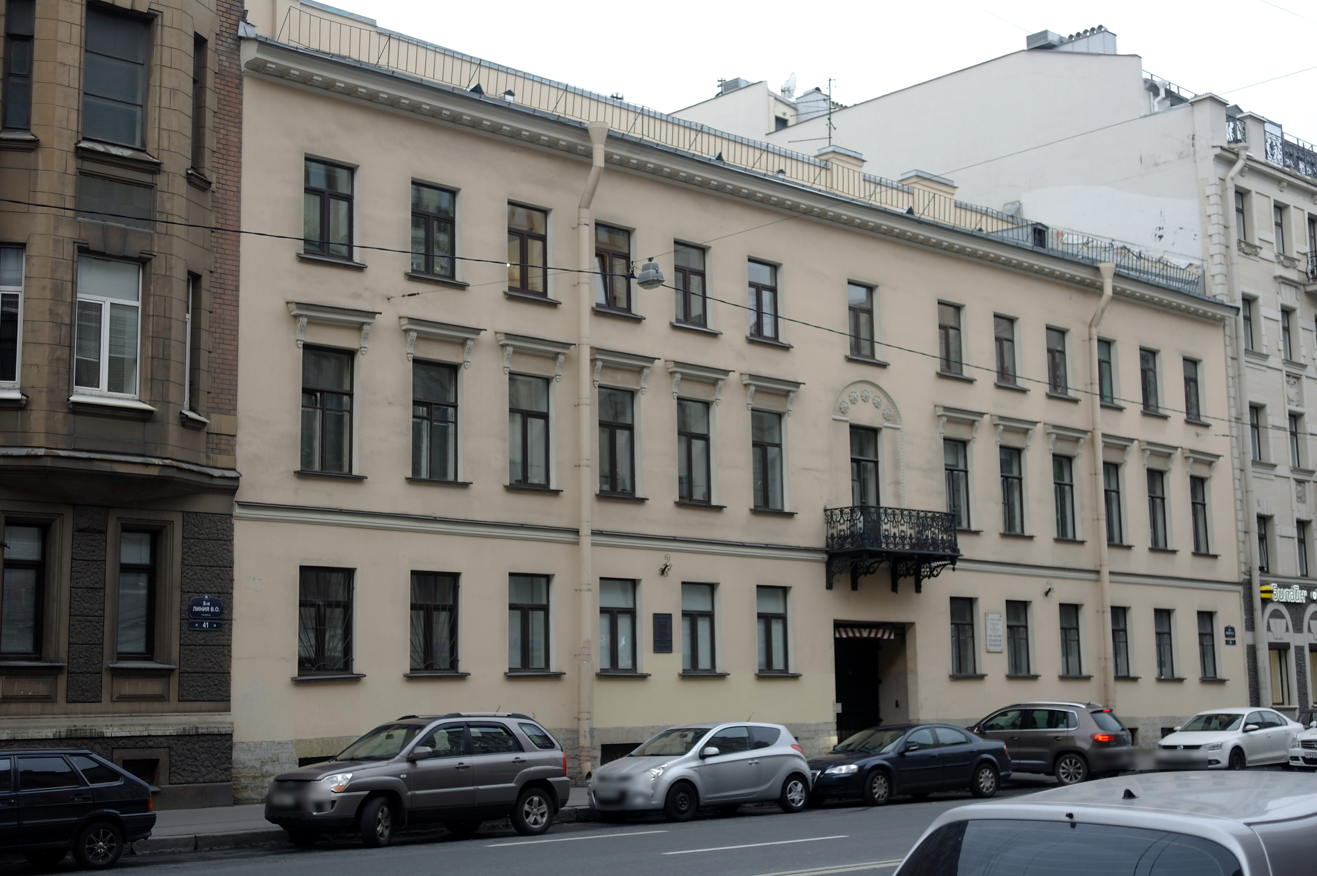 Дом, где жили: в 1855-1858 гг.- композитор Чайковский П.И., в 1861-1914 гг.- географ Семенов-Тян-Шанский П.П., в 1851-1881 гг.- экономист Заблоцкий-Десятовский А.П.: 8-я линия Васильевского острова, 39, Василеостровский район, Санкт-Петербург